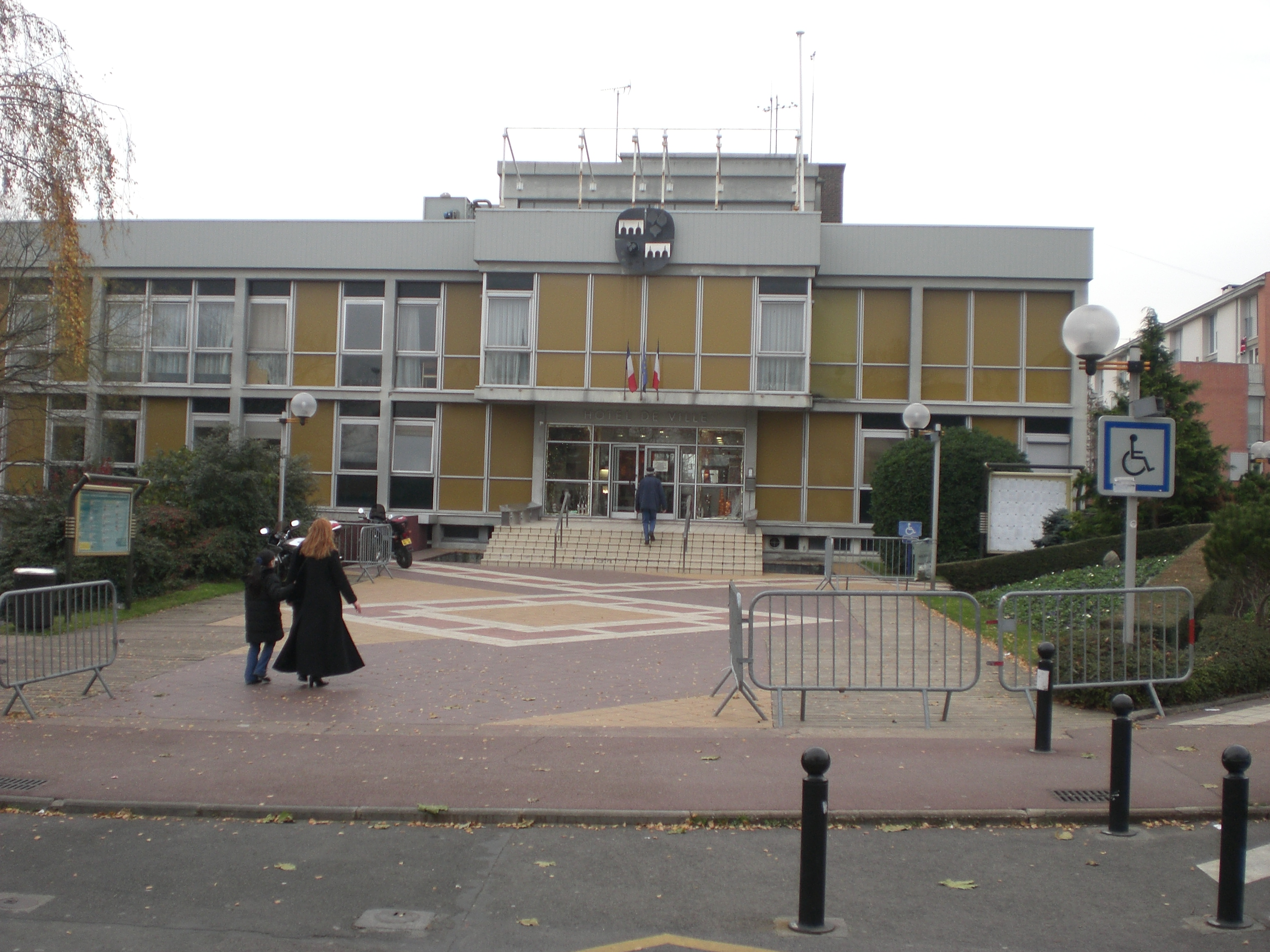 Arcueil, France Entrée de la mairie d'Arcueil